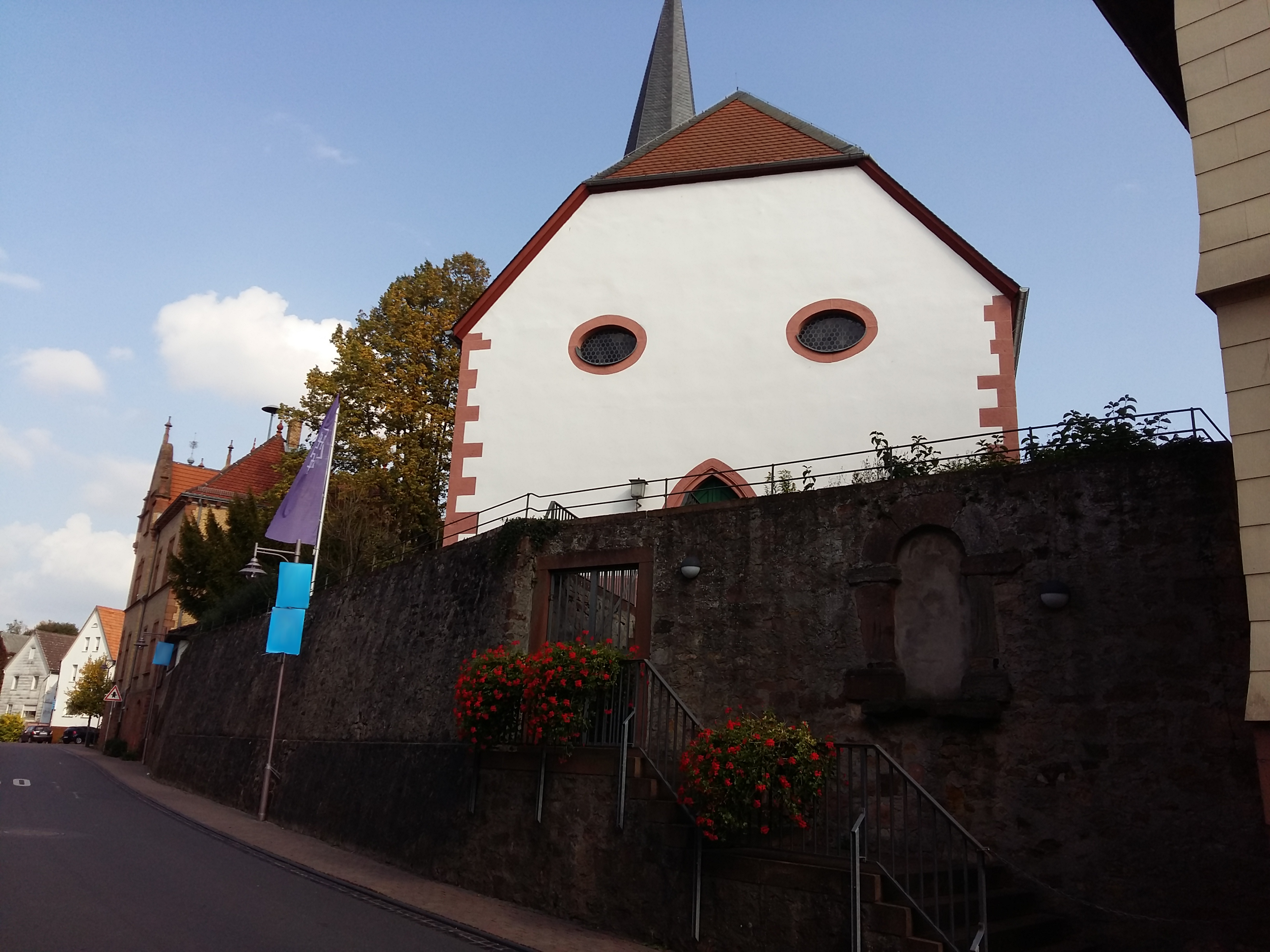 Blick auf die Kirche von Ueberau, von der Wilhem-Leuchner-Straße